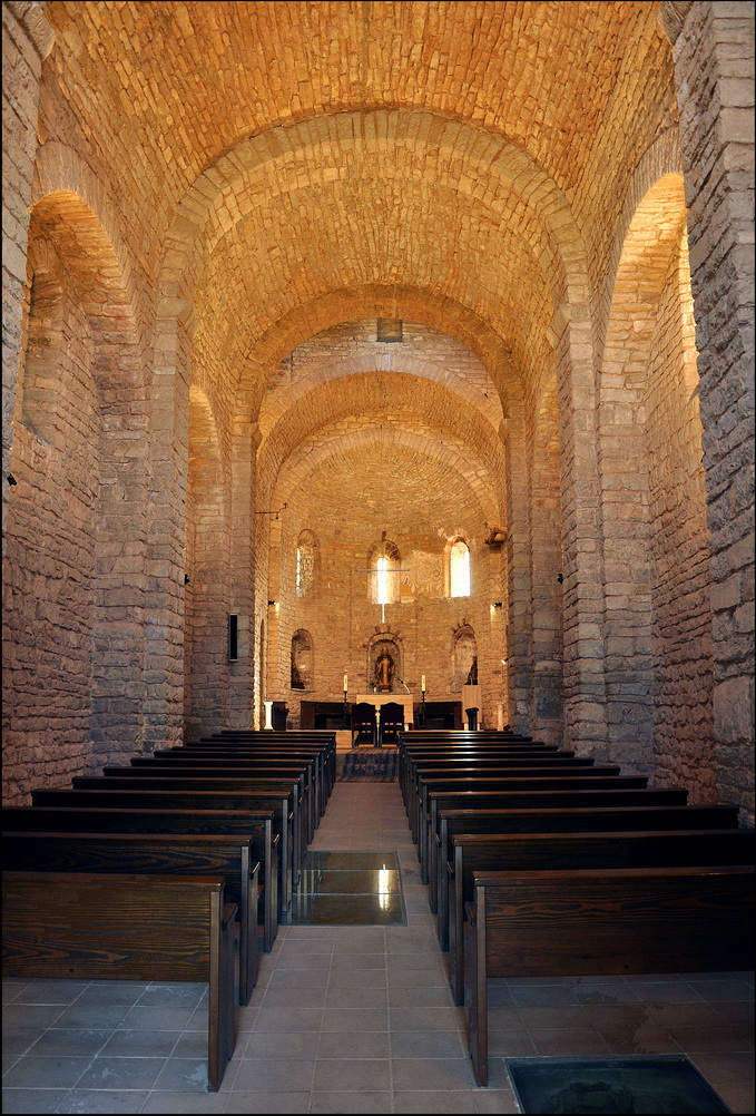 Església de Sant Ponç de Corbera (Cervelló)